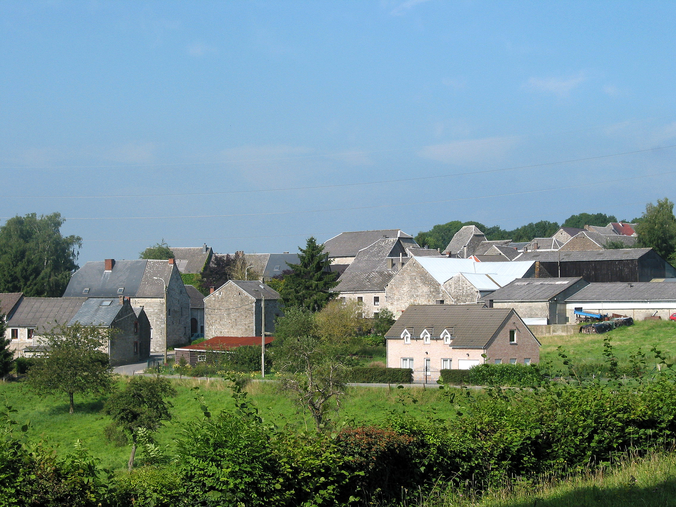 Filot (Belgique)